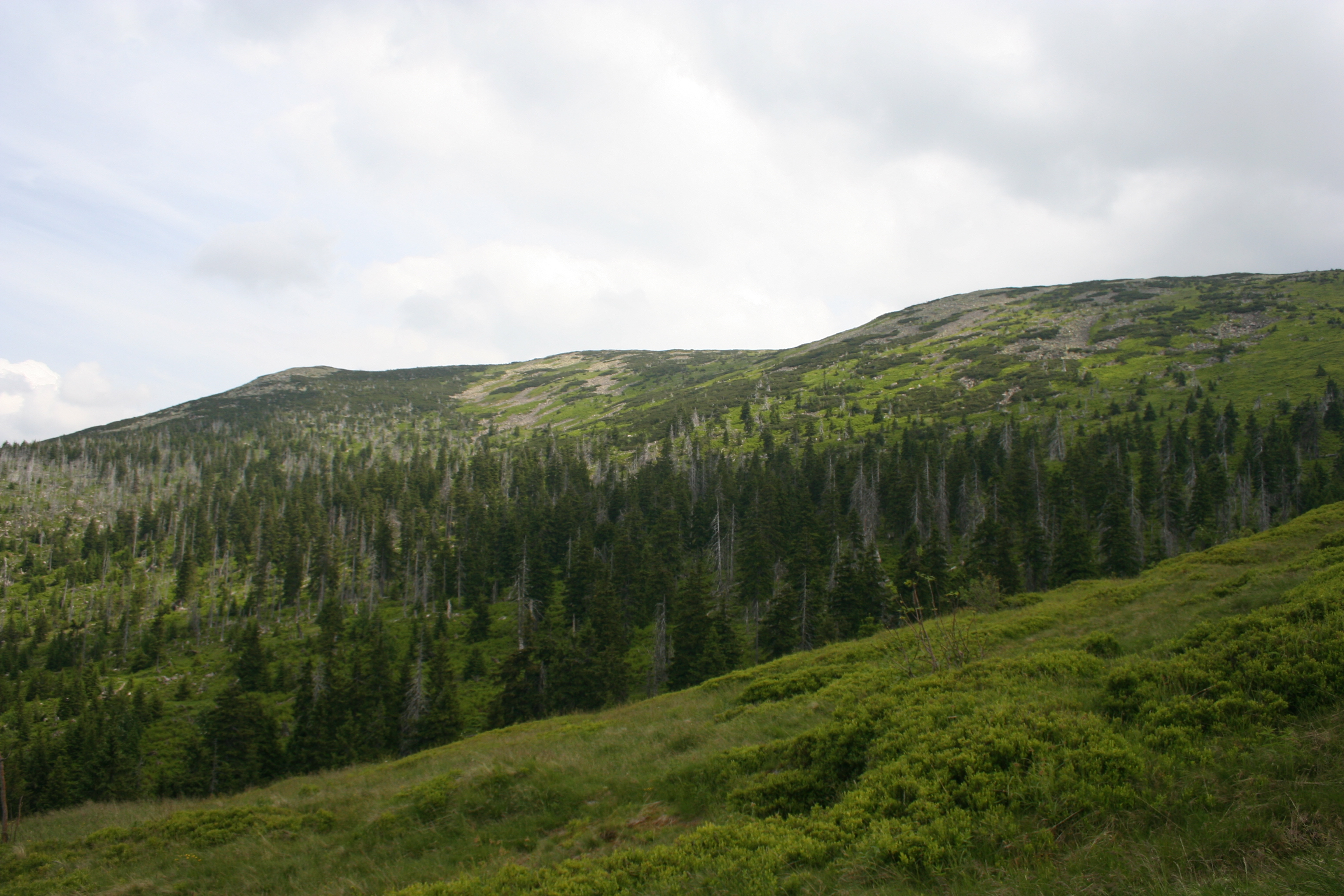 Łabski Kocioł (Łabski Cirque) and Łabski Szyczt (Łabski Summit, 1472 m), Karkonosze Mountains, Poland.